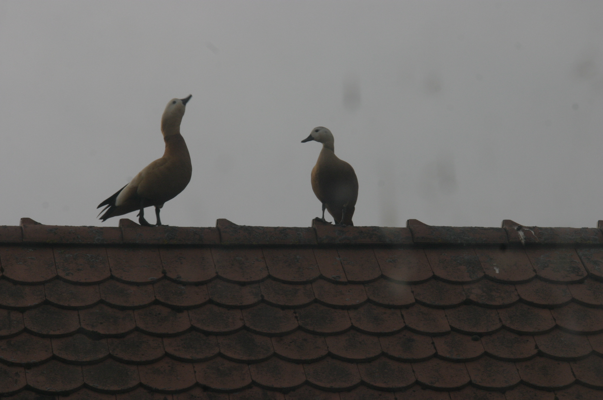 Zwei Rostgänse auf einem Dachfirst bei der morgendlichen Liebesverkündigung